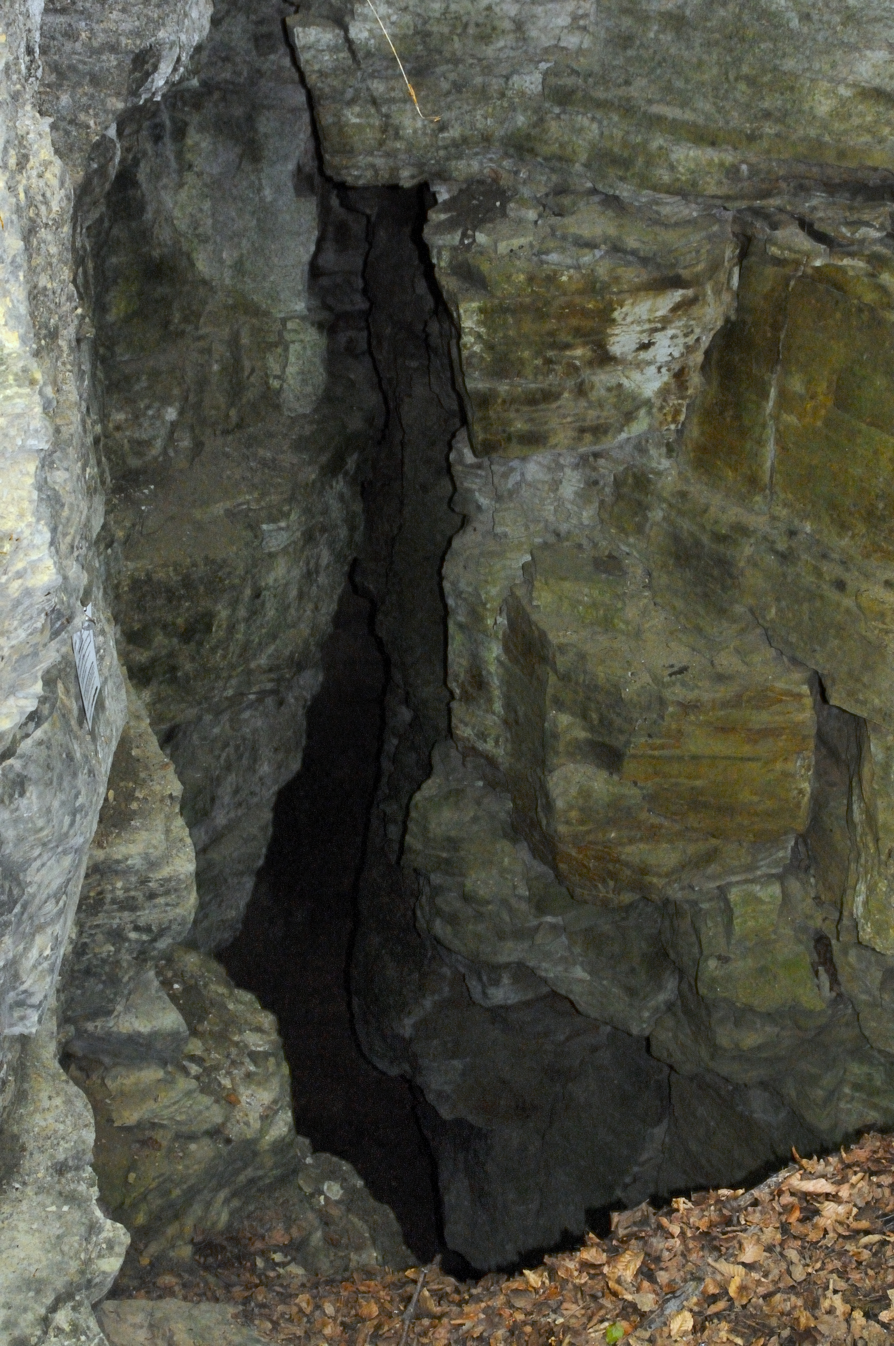 Felsspalte auf der Keudelskuppe, genannt "Taterloch".